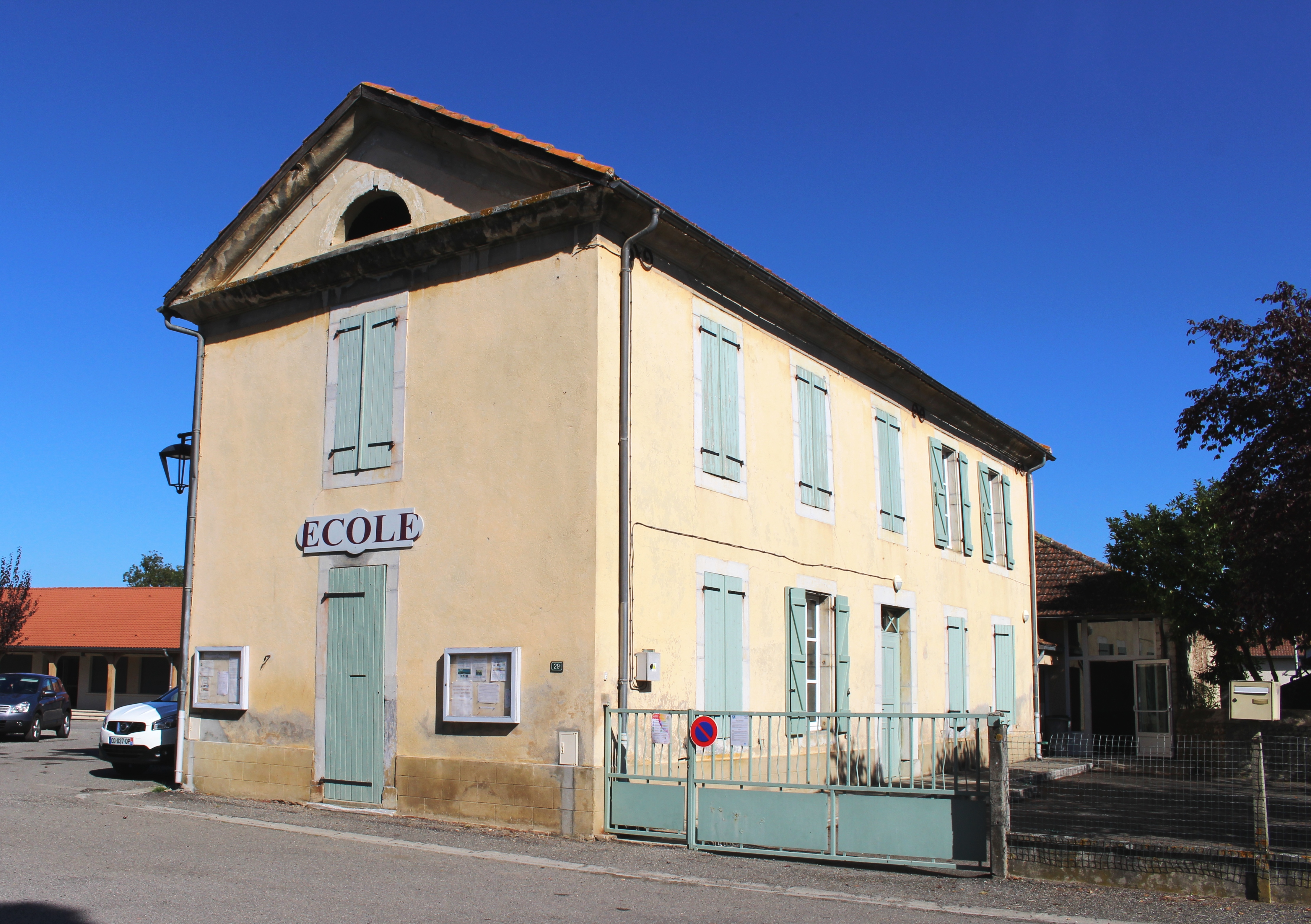 École de Cabanac (Hautes-Pyrénées)